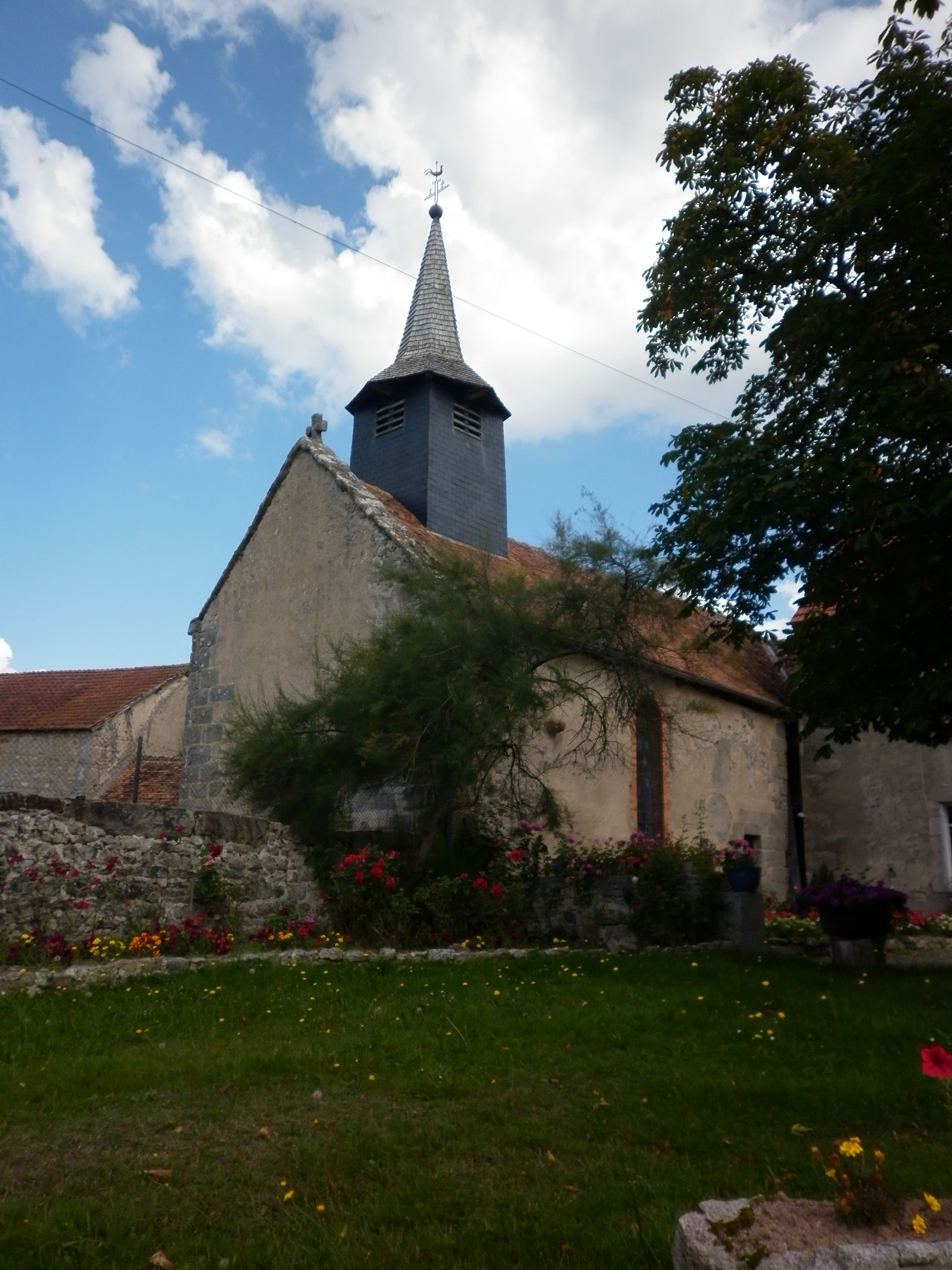 L'Eglise Saint Nicolas des Forges, classée monument historique en 1969, est située aux Forges dans la commune de Gouzon (Creuse) This building is en partie classé, en partie inscrit au titre des Monuments Historiques. .